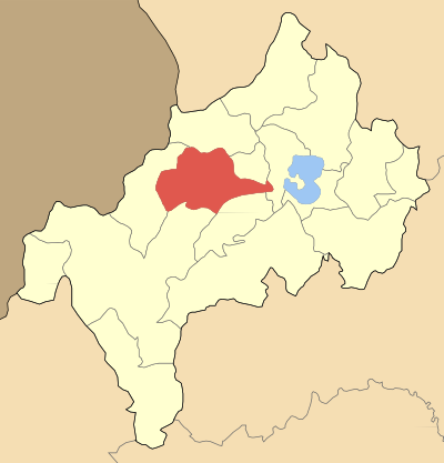 Дем Бистрица на картата на Ном Костур, Гърция. Locator map of Aliakmona municipality (Δήμος Αλιάκμονα) at Kastoria perfecture, Greece).